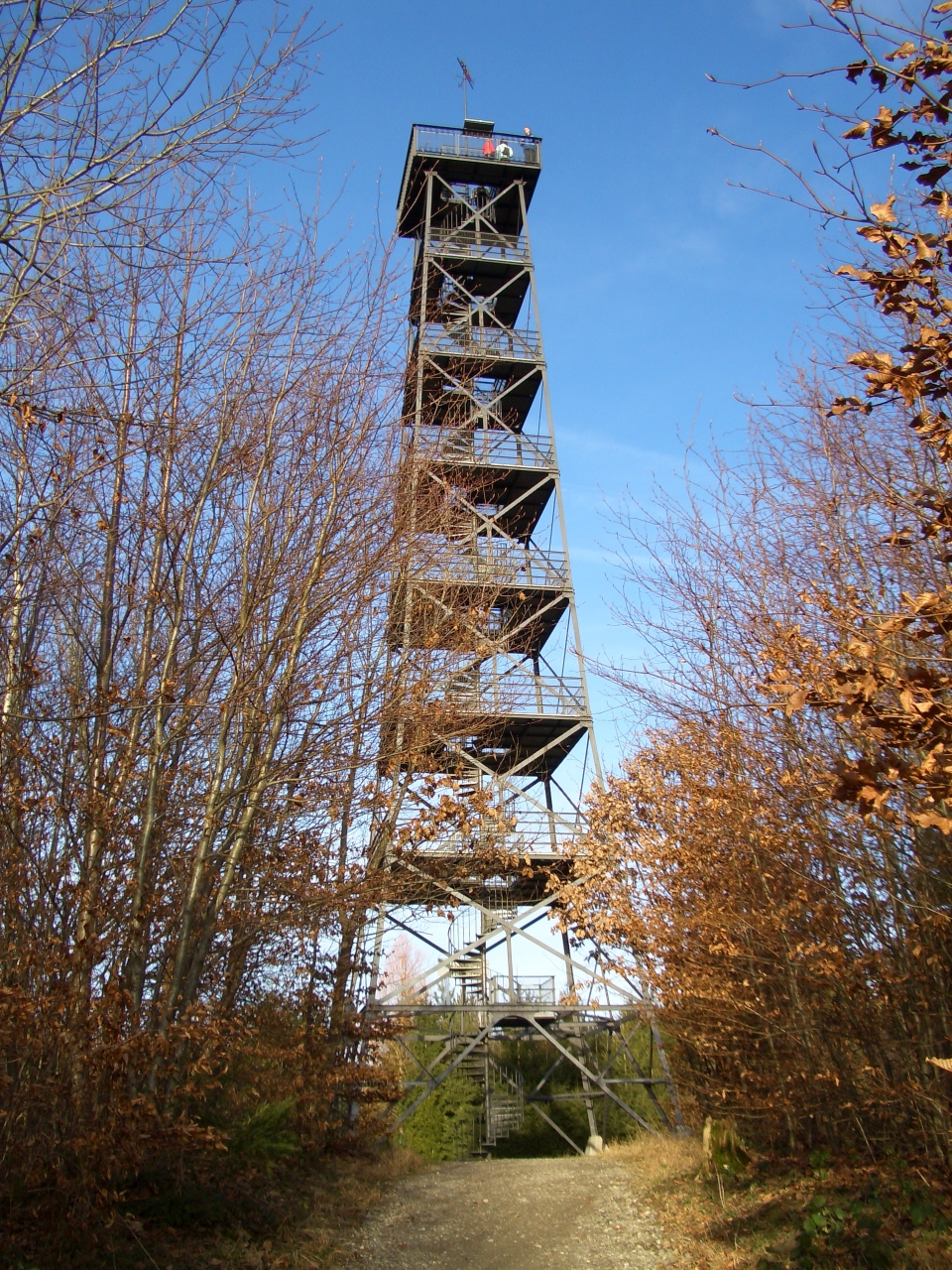 Eschenbergturm, Winterthur